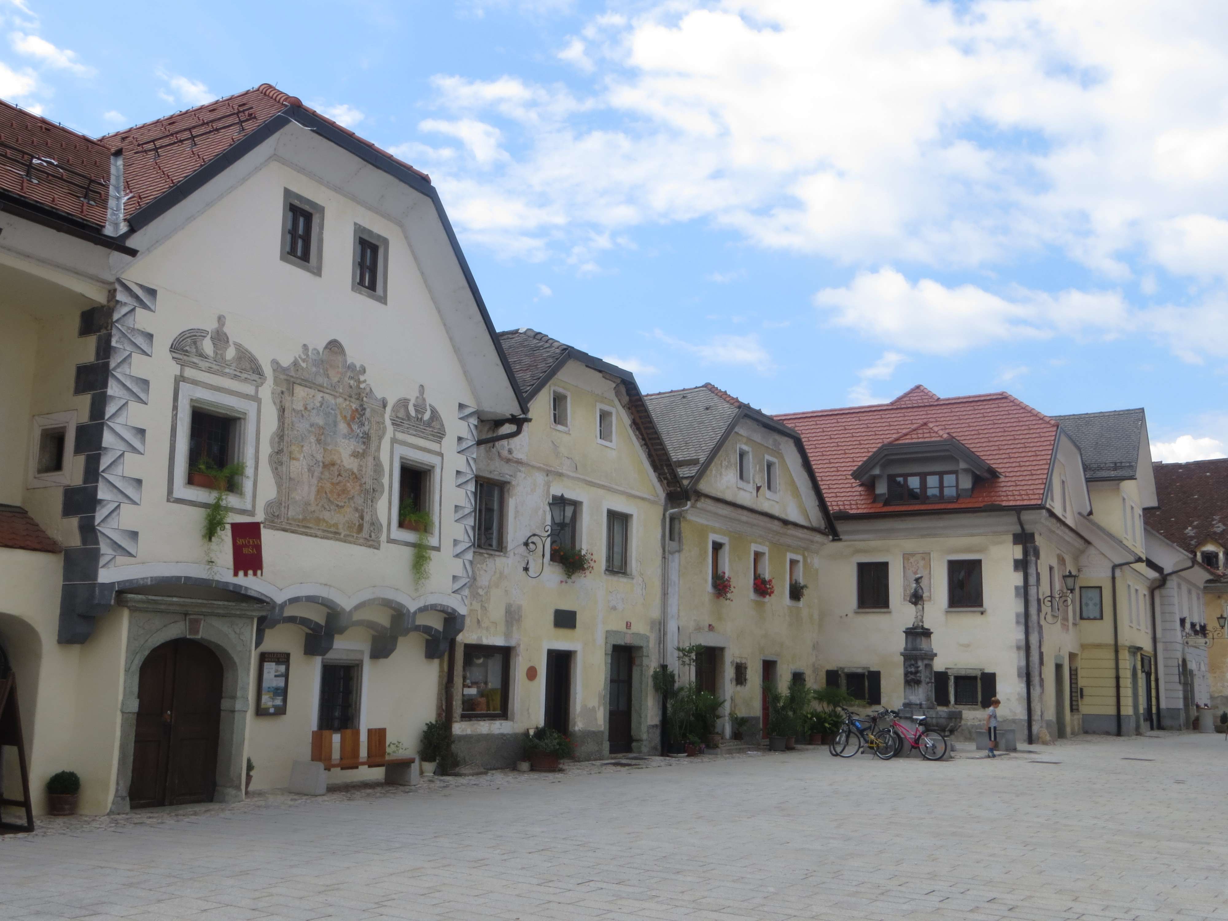 Radovljica